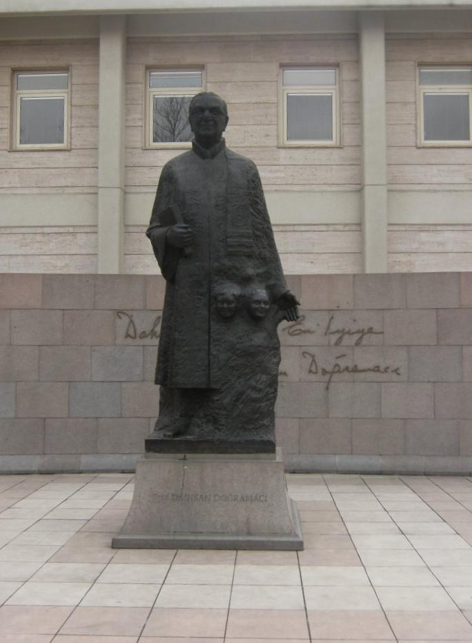 Hacettepe Üniversitesi İhsan Doğramacı Çocuk Hastanesi bahçesinde bulunan heykel